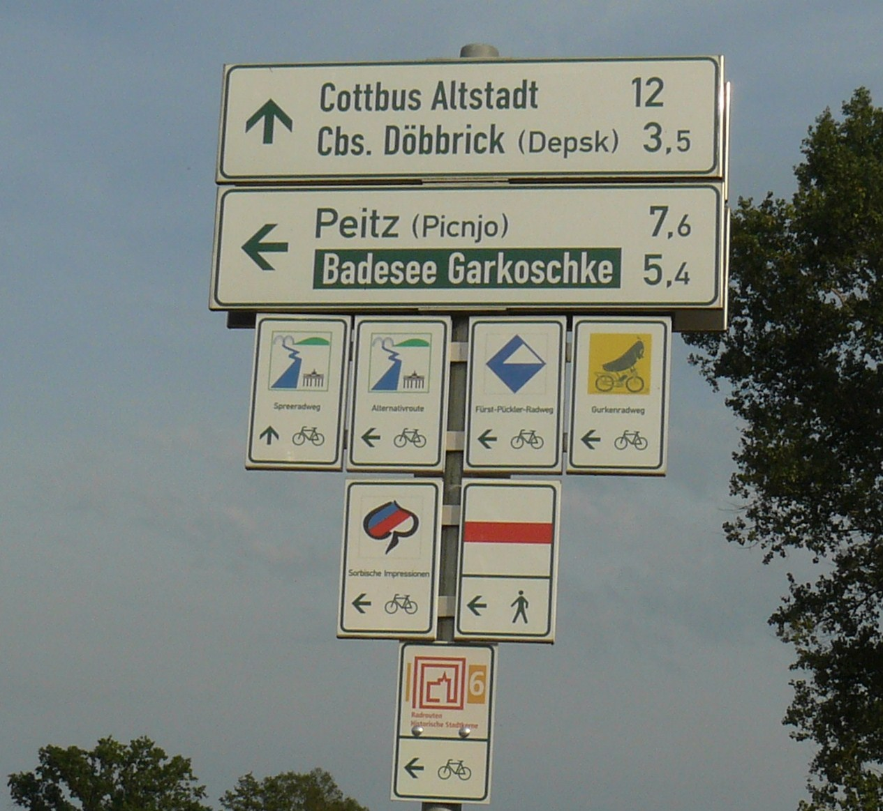 Gurkenradweg. Szlak ogórkowy, Spreewald.